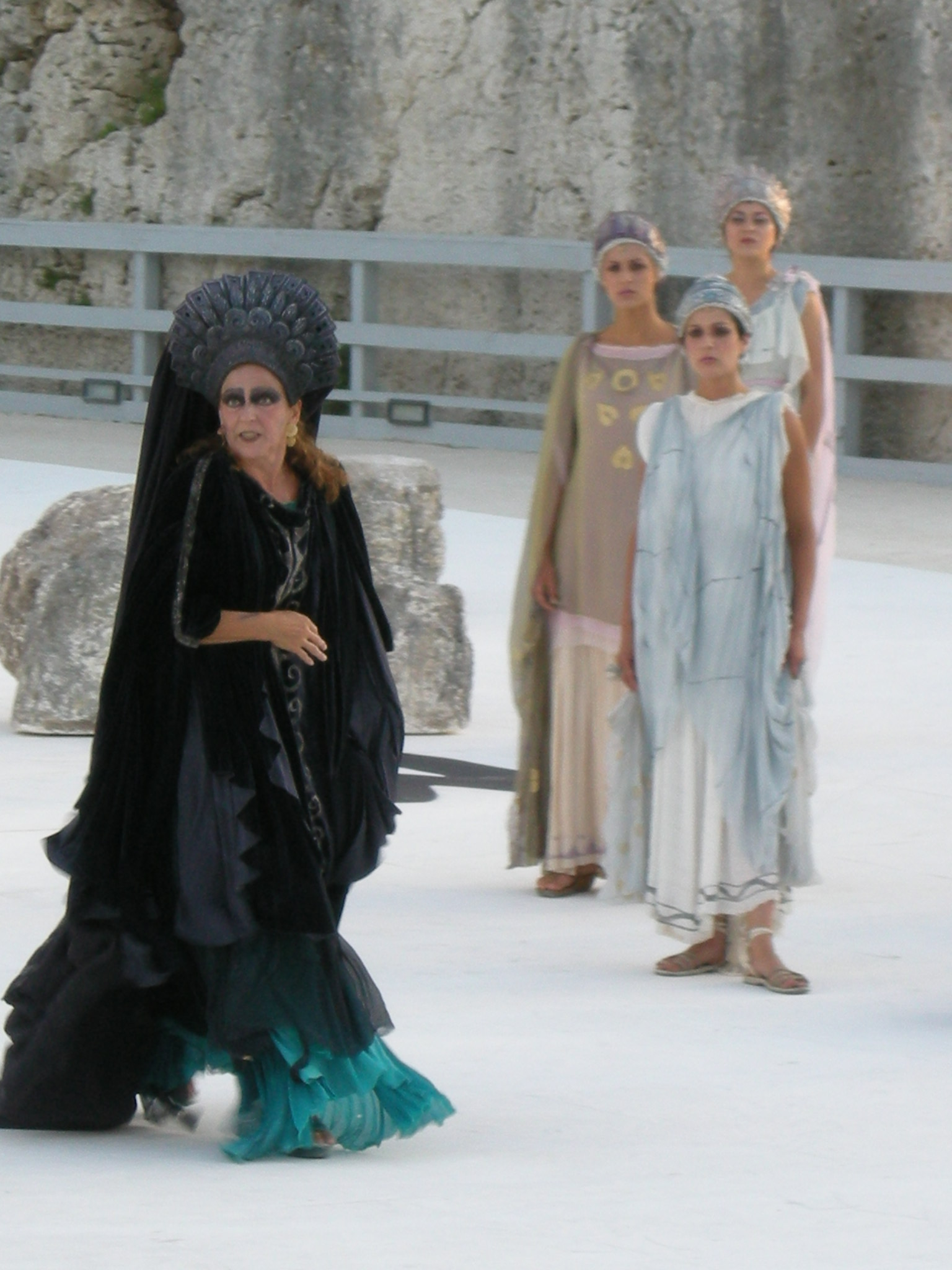 Elisabetta Pozzi as medea